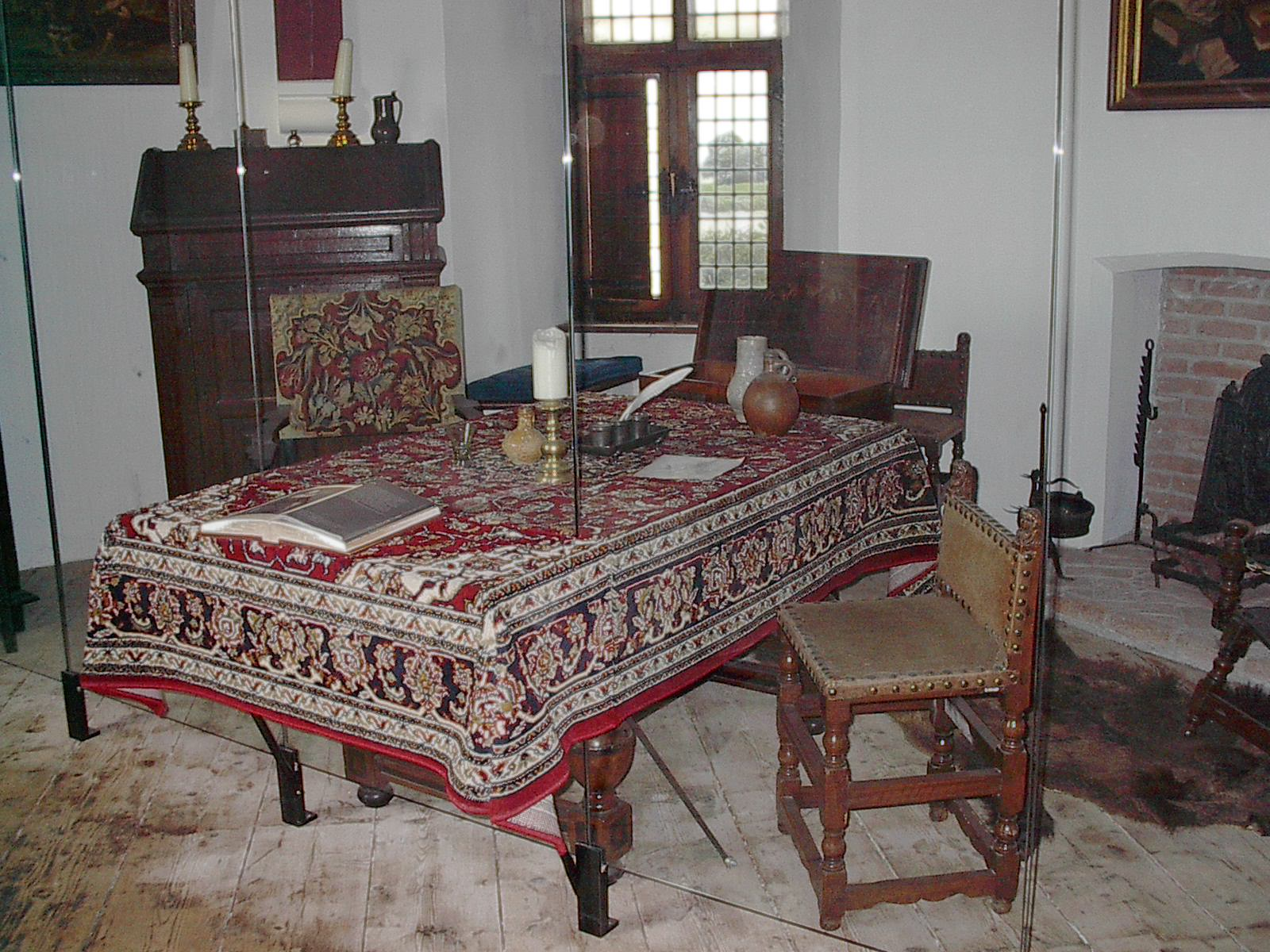 Werkkamer van P.C.Hooft, Muiderslot, The Netherlands